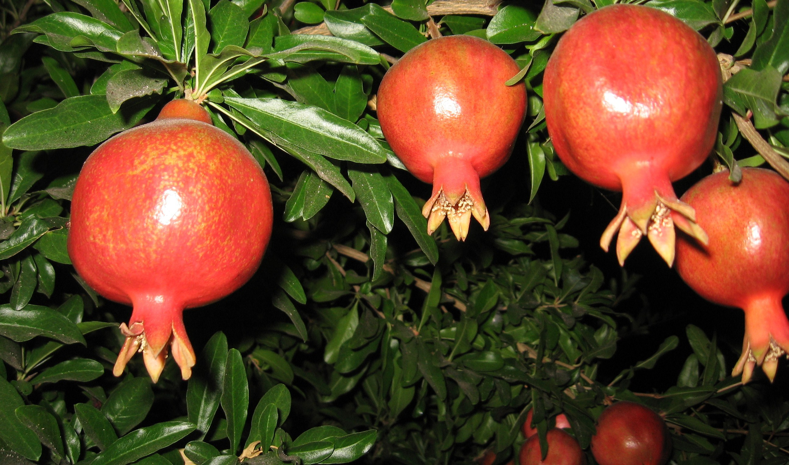 רימונים על העץ